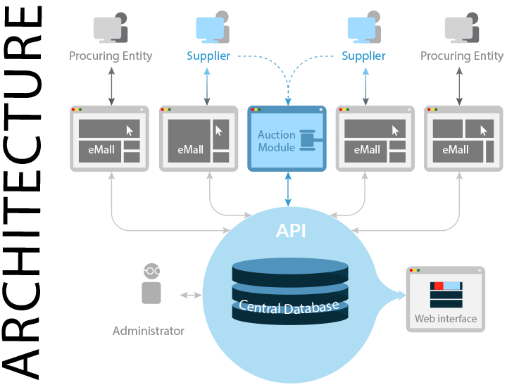 La description de l'architecture d'Open Procurement - une boîte à outils open source, conçue pour le processus des approvisionnements électroniques.